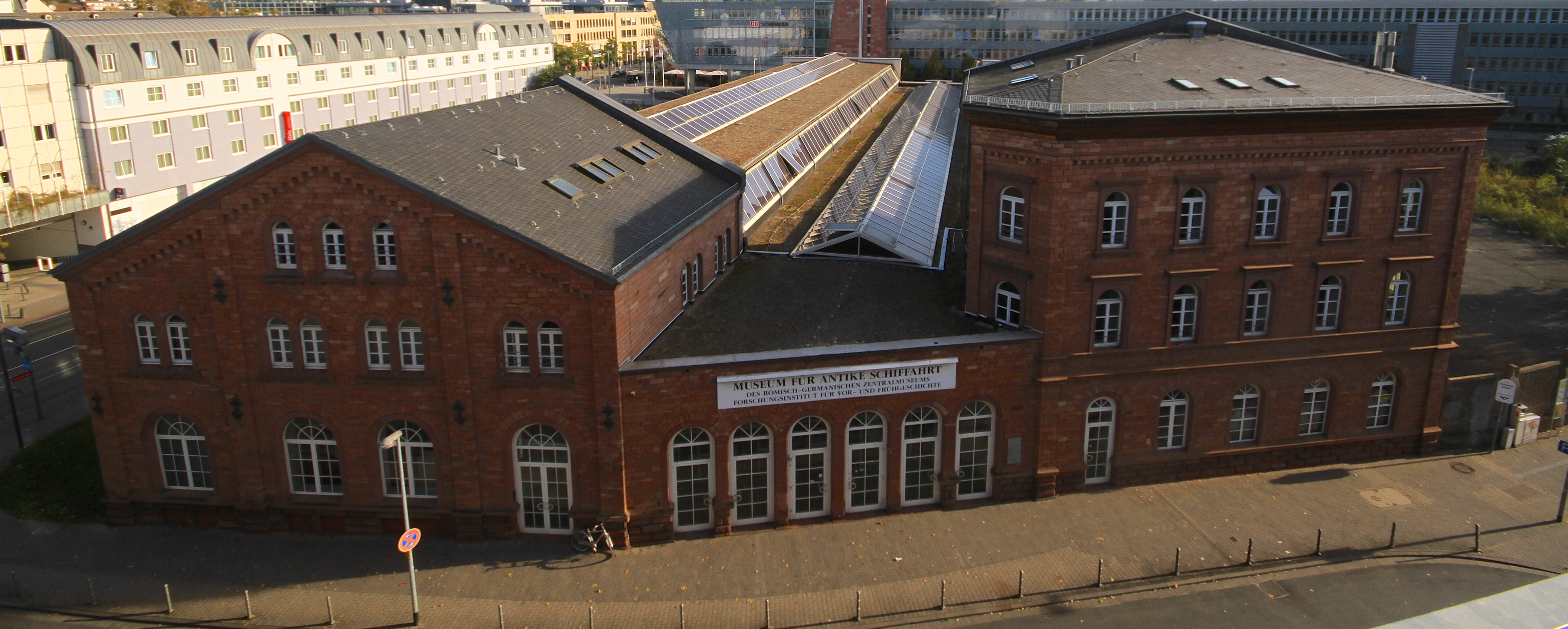 Museum für antike Schiffahrt, Mainz